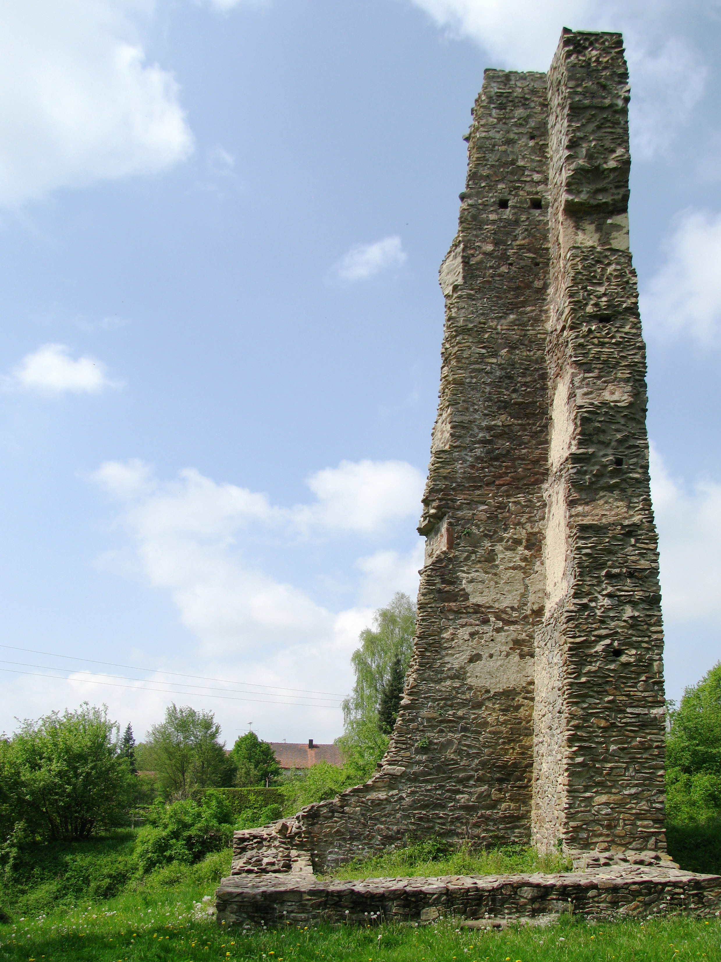 Burgruine Neujochenstein